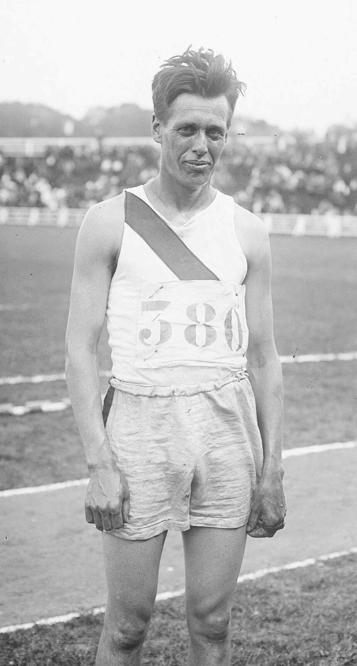 [Fred] Faller gagnant du marathon [championnats d'athlétisme de l'armée américaine à Colombes, 1er juin 1919] : [photographie de presse] / [Agence Rol]